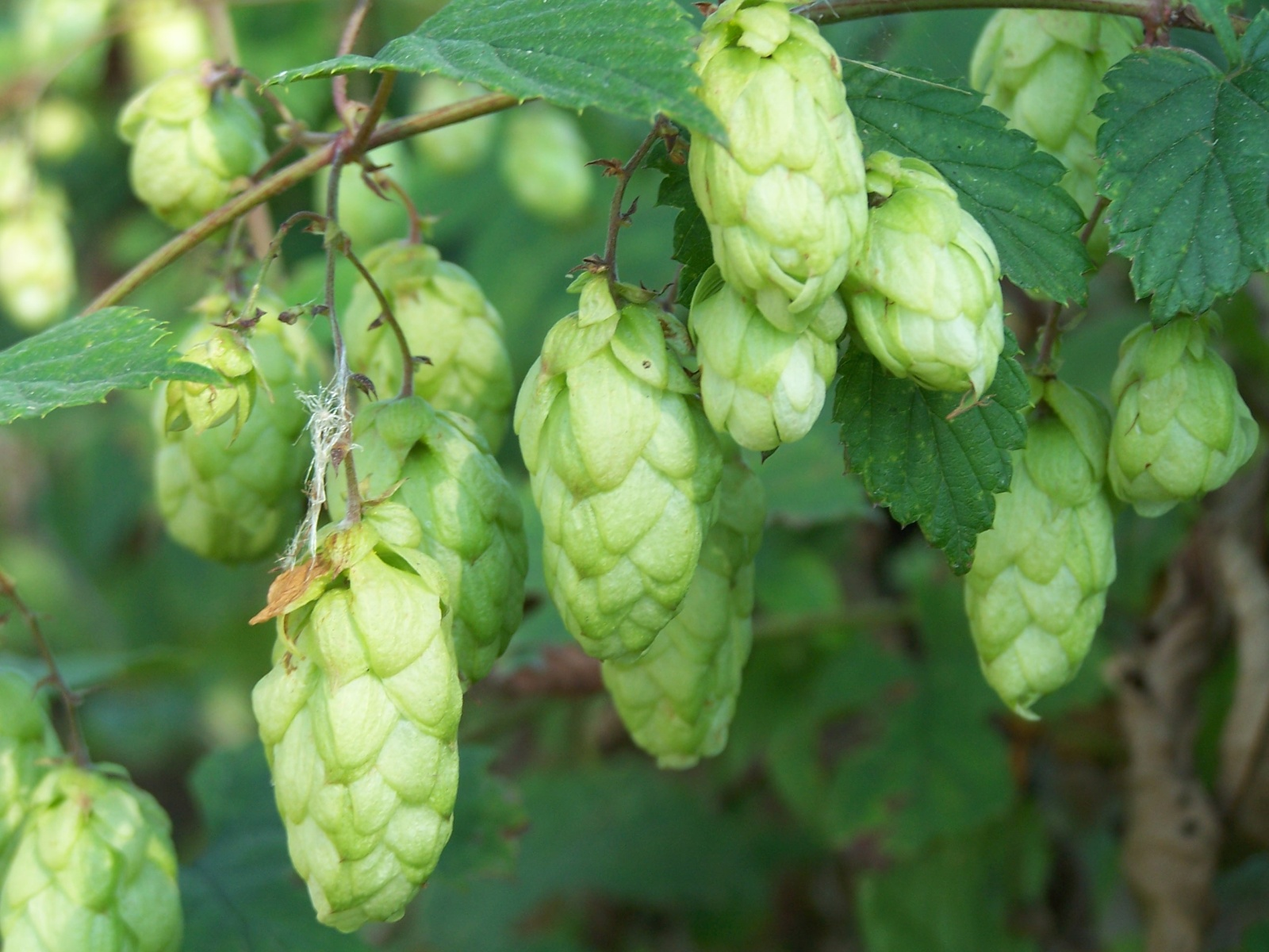 Humulus lupulus self made by Nejmlez